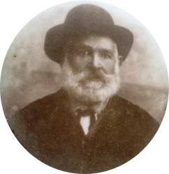 Pietrino Monni Serra (foto della tomba), intellettuale e politico di Orune